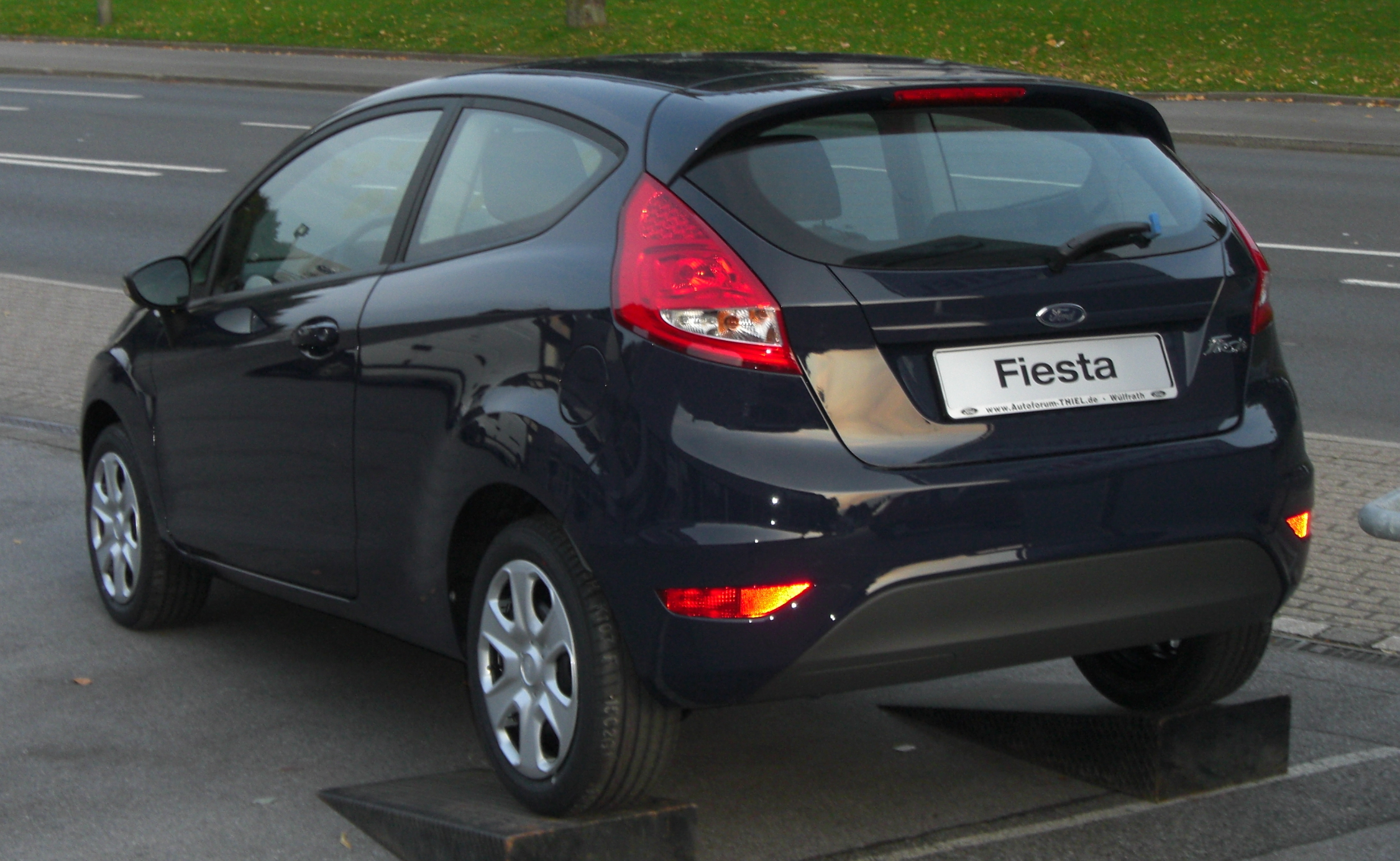 Ford Fiesta MK6 „Trend“